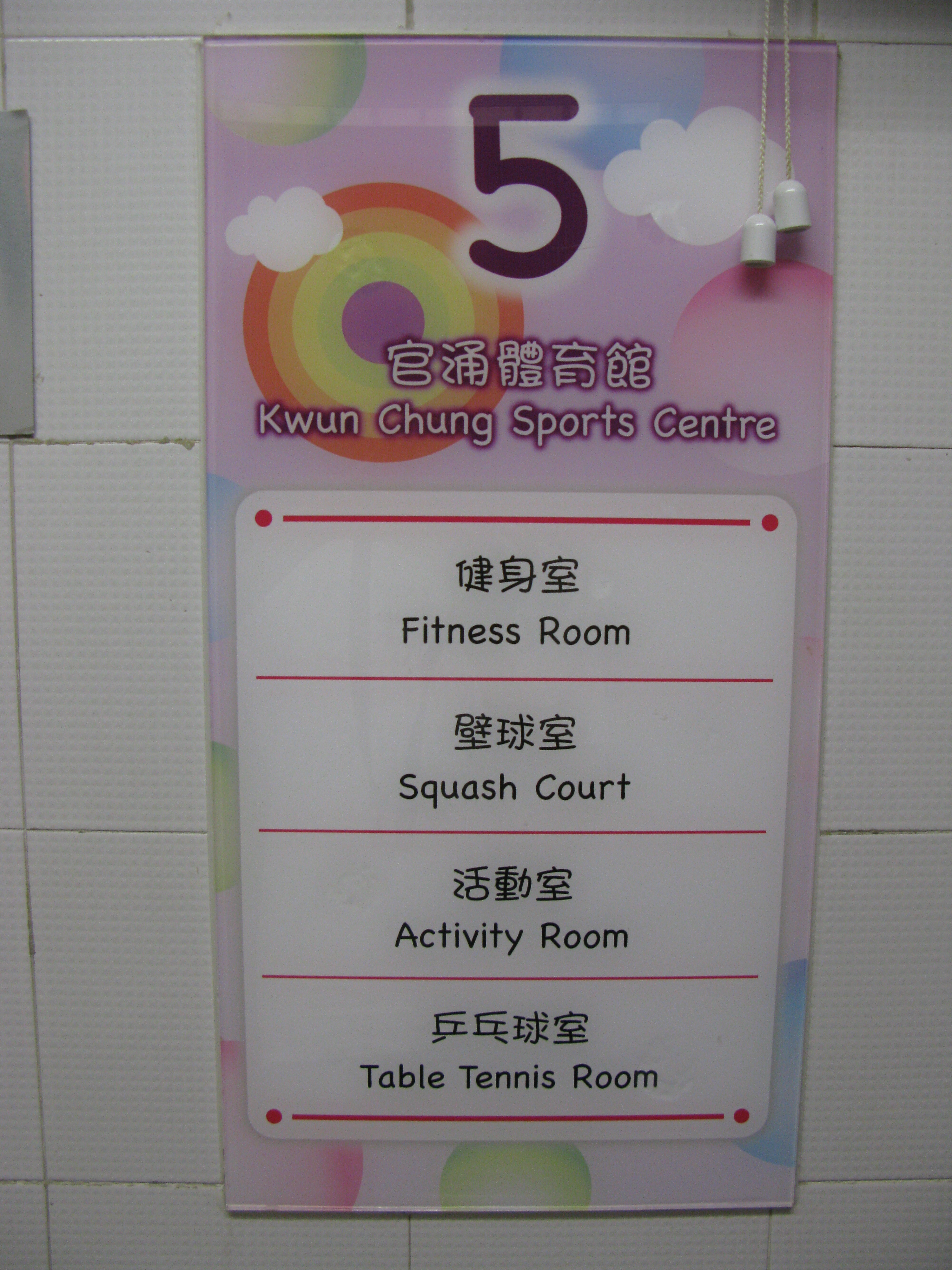 官涌體育館